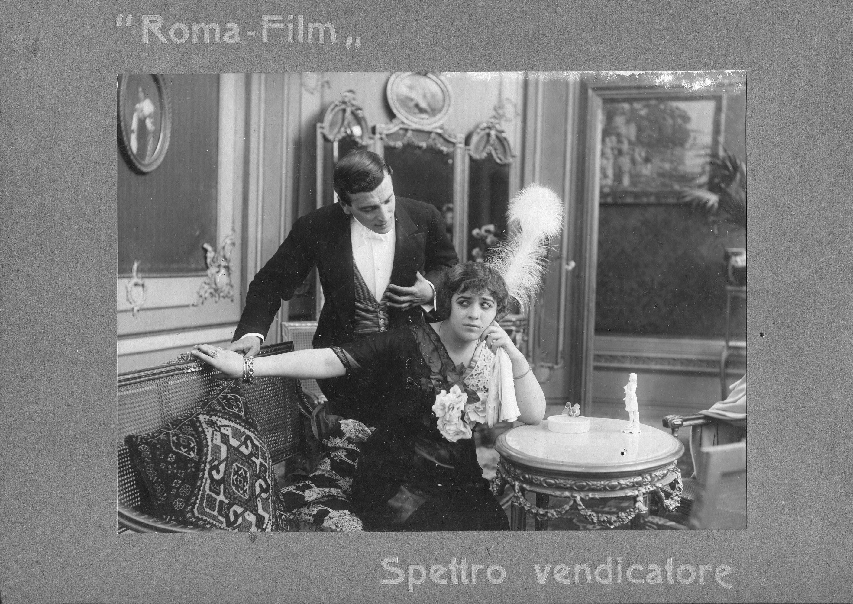 Scena tratta dal film di Romolo Bacchini "Spettro Vendicatore" (1914)